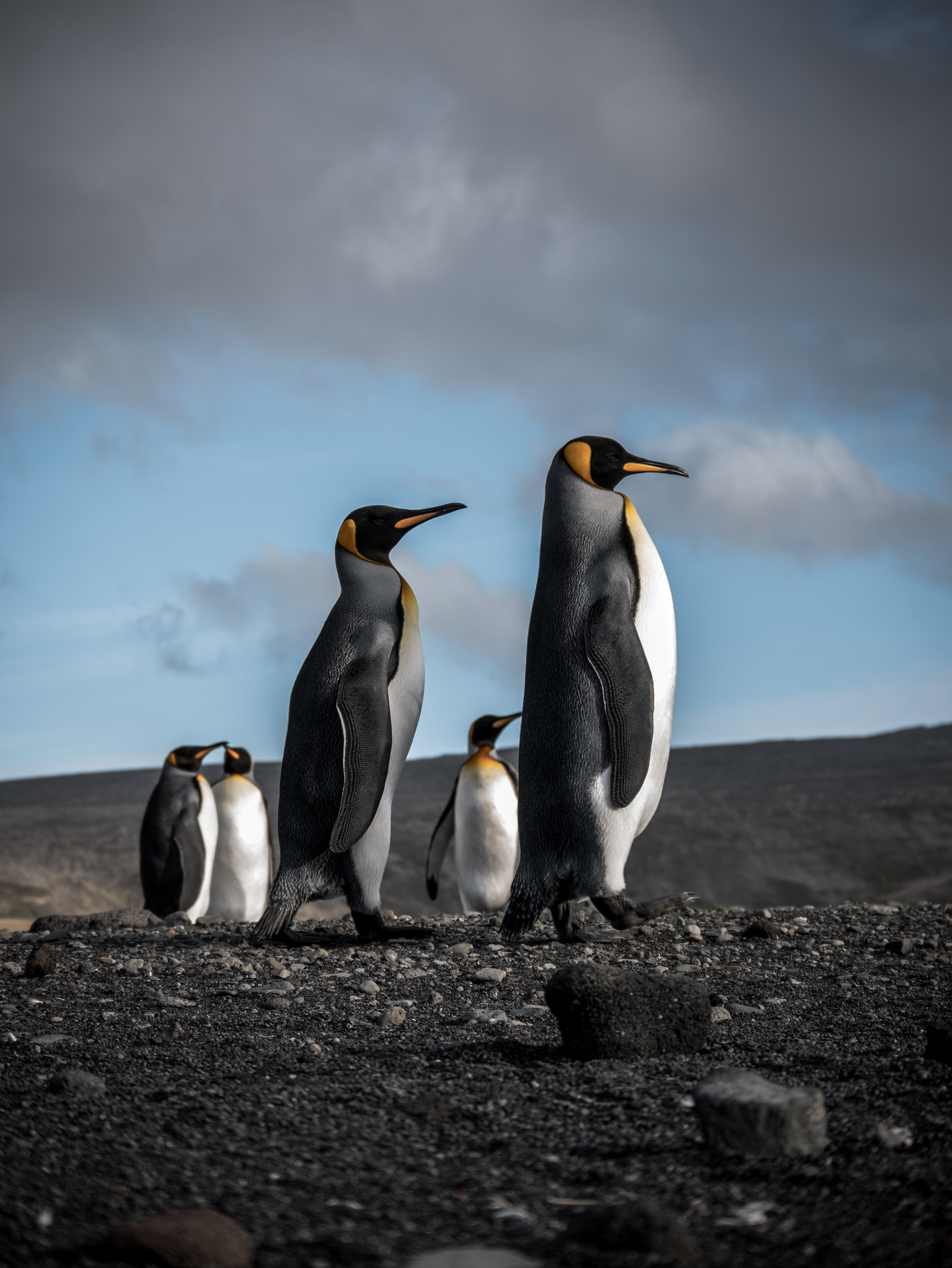 Manchot royal - Terres Australes et Antarctiques Françaises